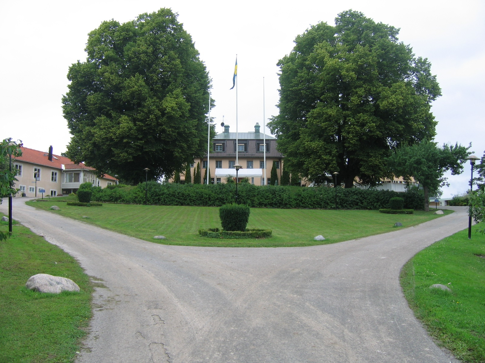 Såsta